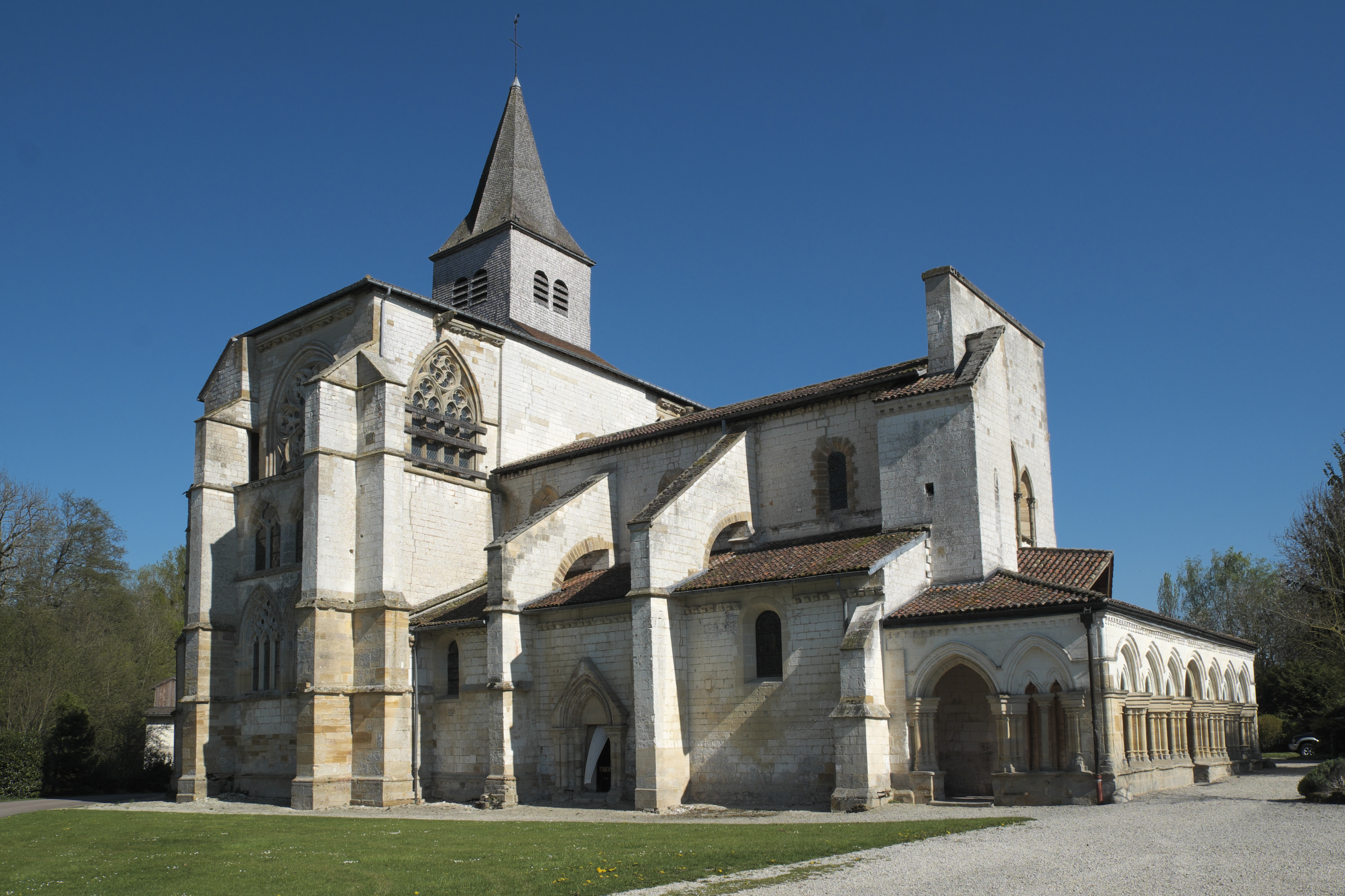 Katholische Pfarrkirche Saint-Amand in Saint-Amand-sur-Fion im Département Marne in der Region Grand Est/Frankreich